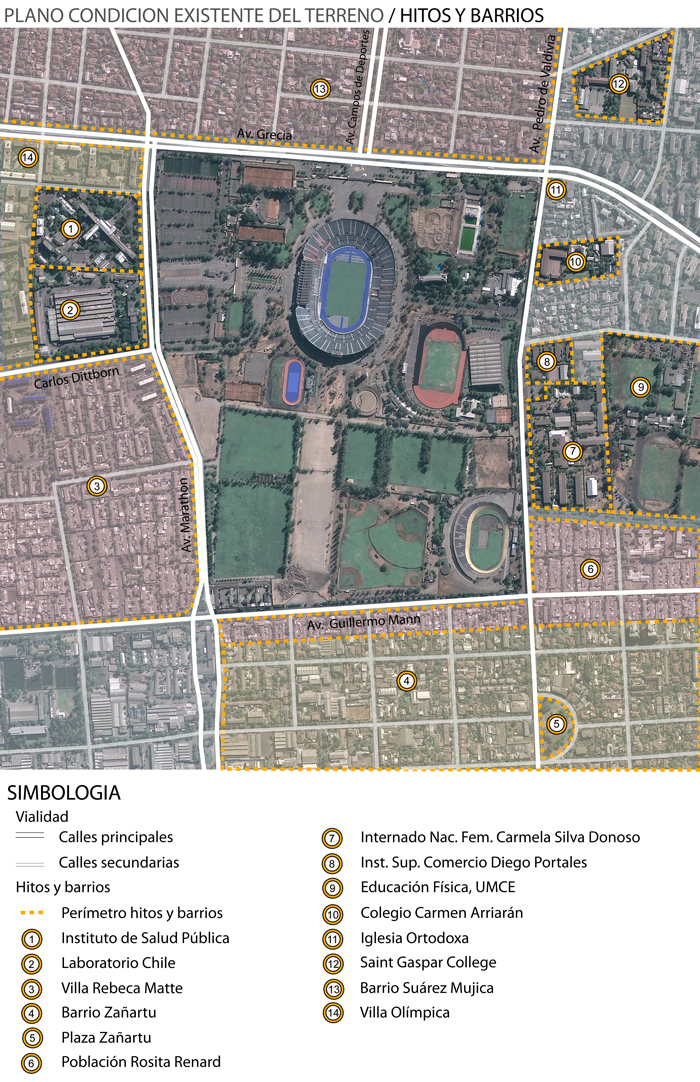 Hitos y barrios cercanos al Estadio Nacional de Chile.